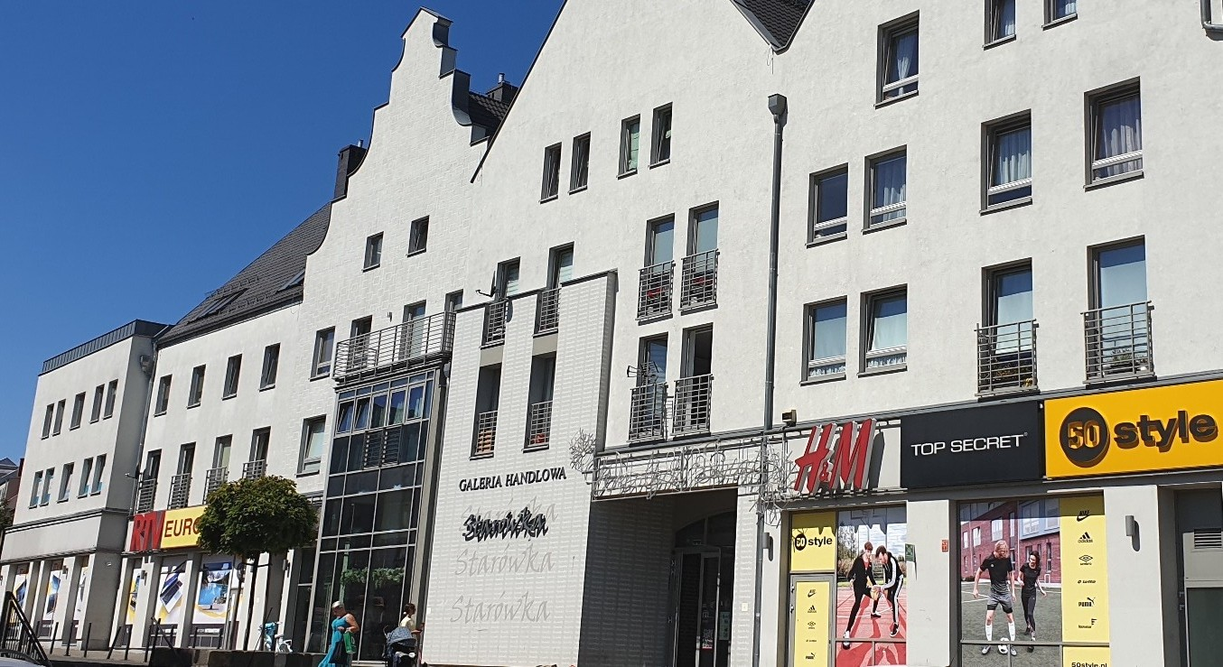 Stargard. Galeria Handlowa Starówka